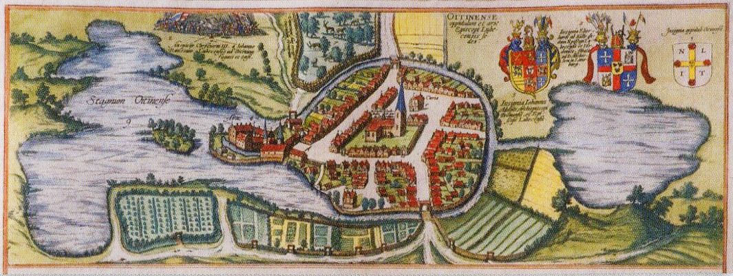 Ansicht Burg und Stadt Eutin aus Braun-Hogenberg, 1586